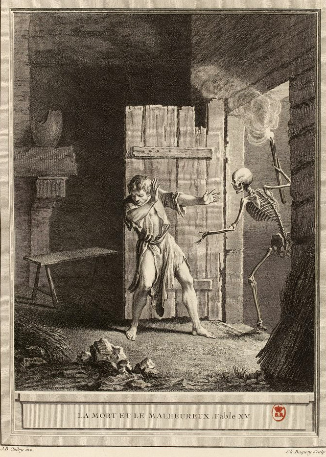 Gravure réalisée par Jean-Charles Baquoy d'après un dessin de Jean-Baptiste Oudry représentant la fable La mort et le malheureux de Jean de La Fontaine (fable 15 du livre I). Cette gravure est parue dans l'édition complète des fables de La Fontaine, parue en quatre tomes chez l'éditeur Desaint & Saillant, rue saint Jean de Beauvais à Paris, 1755-1759.